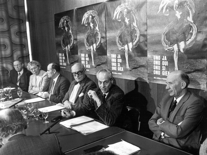 Uno-Beitritt der Schweiz: Pressekonferenz der Befürworter. Von links: Sigmund Widmer, Hans Erni, Walter Renschler, Peter Sager, Rudolf Friedrich, Franz Muheim. Das Abstimmungsplakat wurde von Hans Erni gestaltet. Volksabstimmung am 16. März 1986 (die Datumsangabe 1983 bei der Quelle kann kaum stimmen)